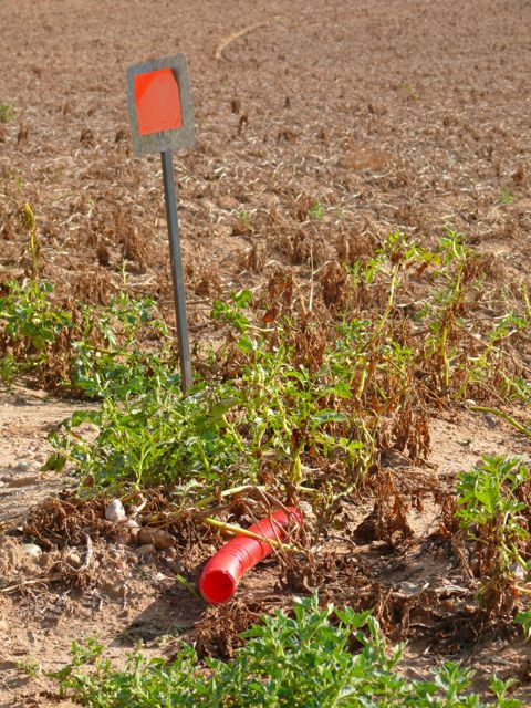 Terreno con tubos de plástico y la señalización de tratamiento fitosanitario, el veneno es utilizado para combatir la plaga de topillos (Microtus arvalis astorianus) en Castilla y León, 2007